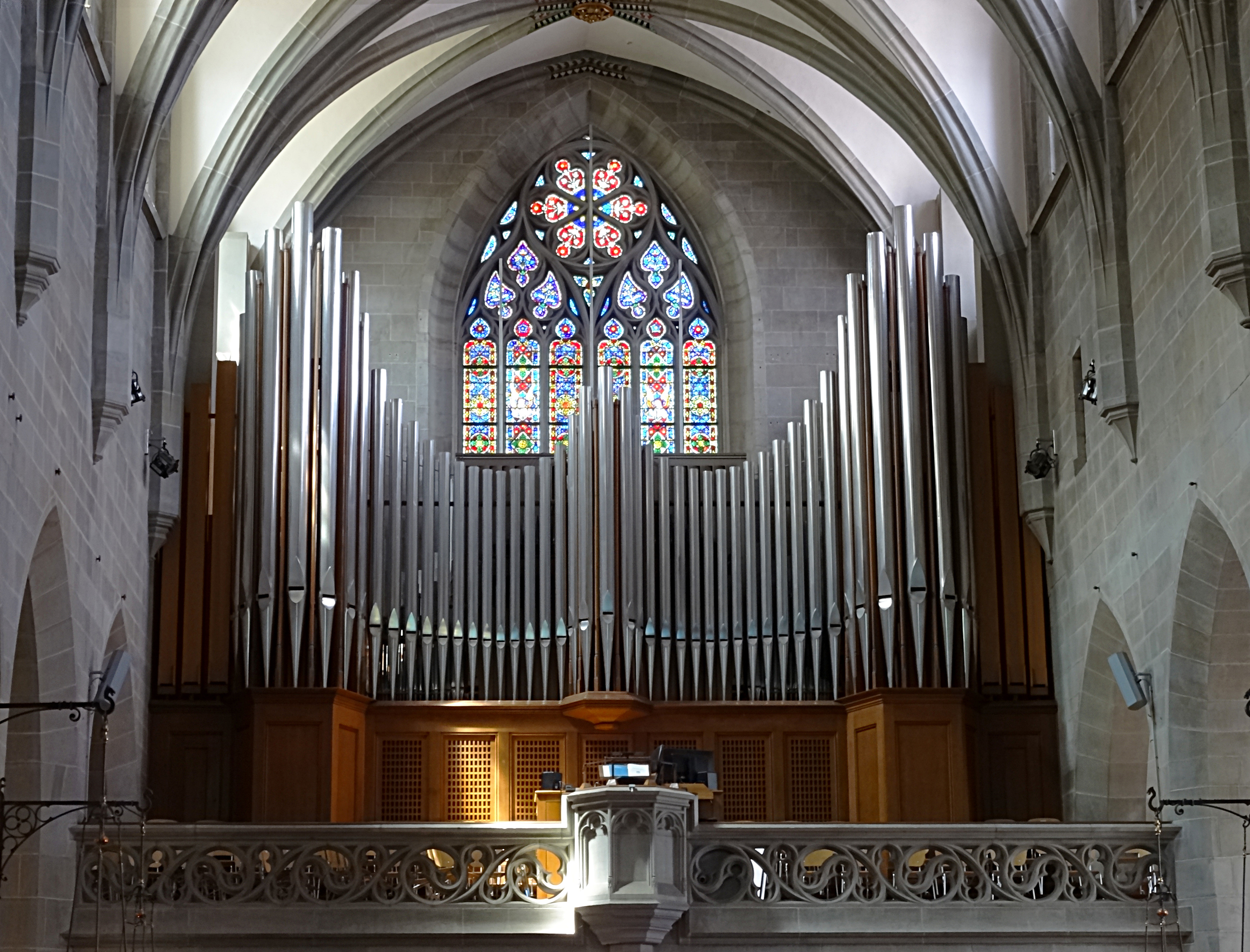 Hauptorgel von Orgelbau Genf AG im Fraumünster Zürich und Heaton-Fenster